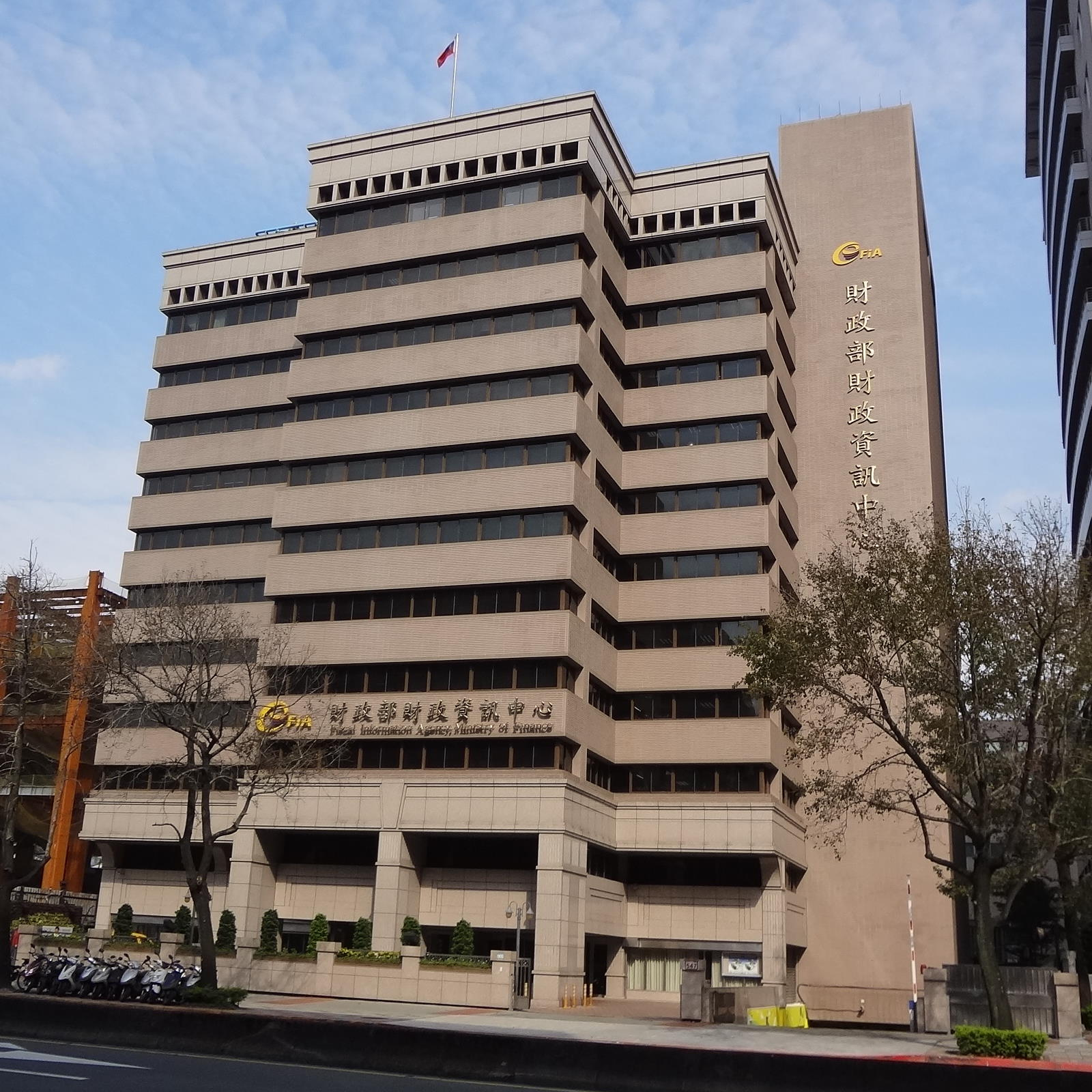 財政部財政資訊中心，位於臺北市信義區忠孝東路四段547號。